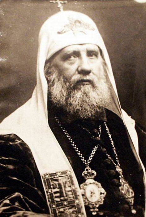 свт. Тихон, Патриарх Московский и всея России